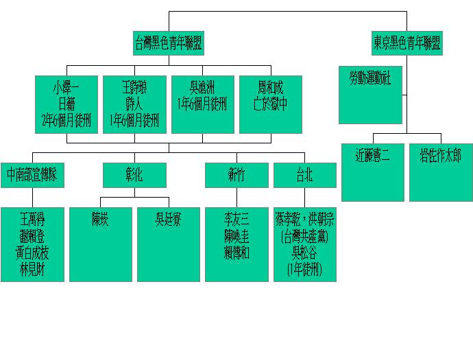 台灣黑色青年聯盟組織圖 2006.06